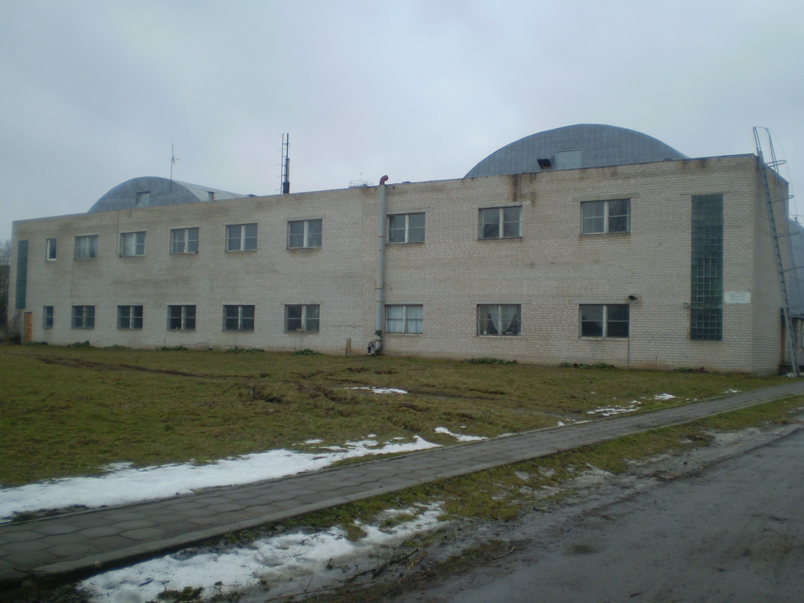 UAB "Sprotinė aviacija" - gamykla, kurioje konstruojami ir gaminami sklandytuvai